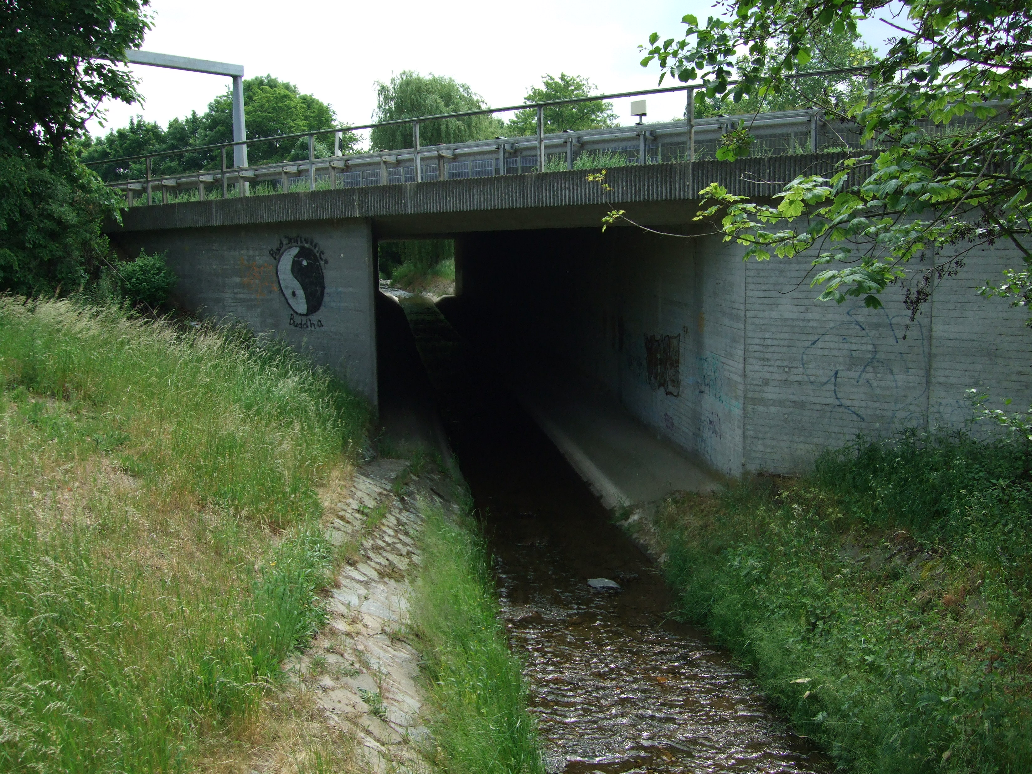 Unterquerung der Wiesbadener-Straße